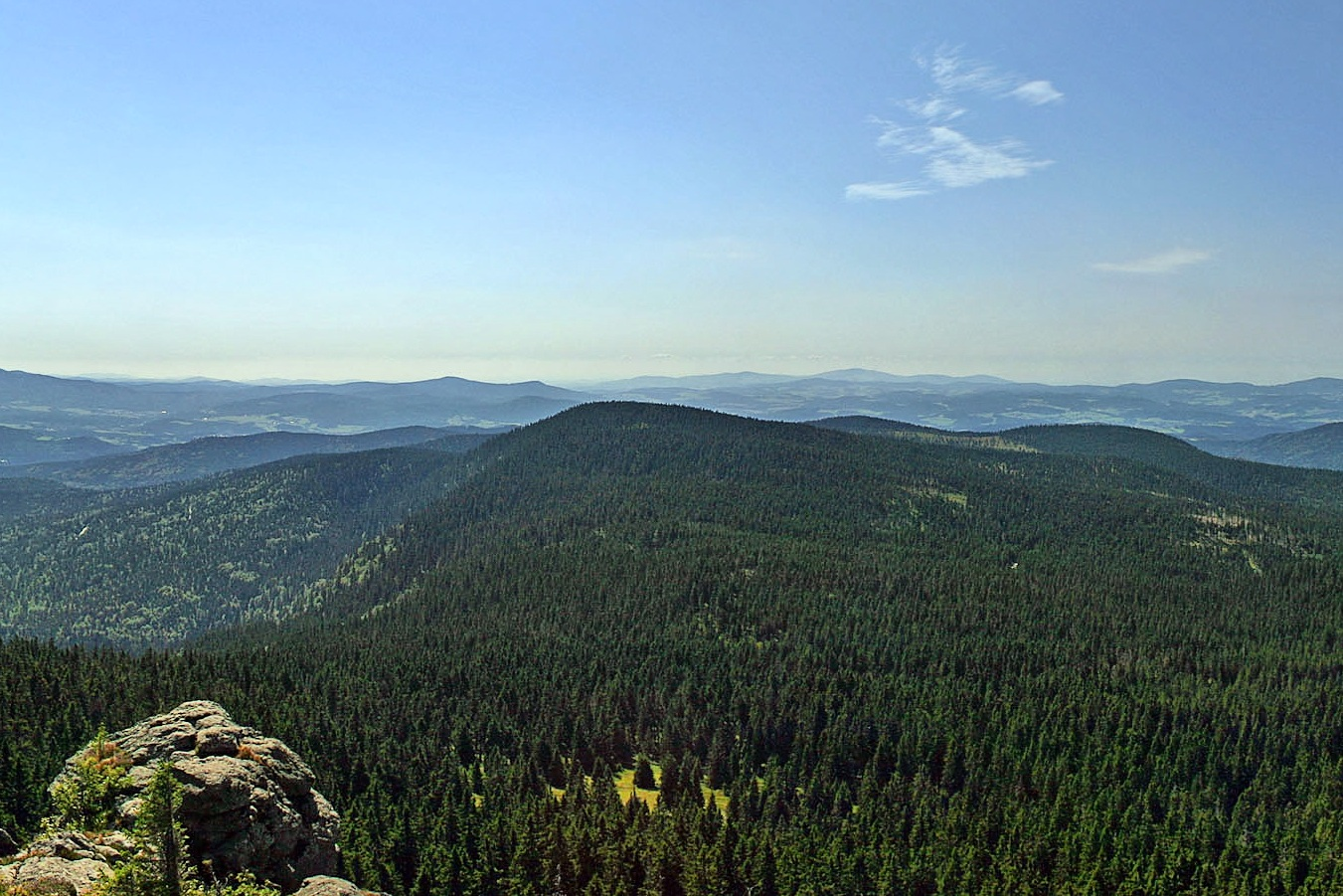 Mittagsplatzl z Velkého Javoru